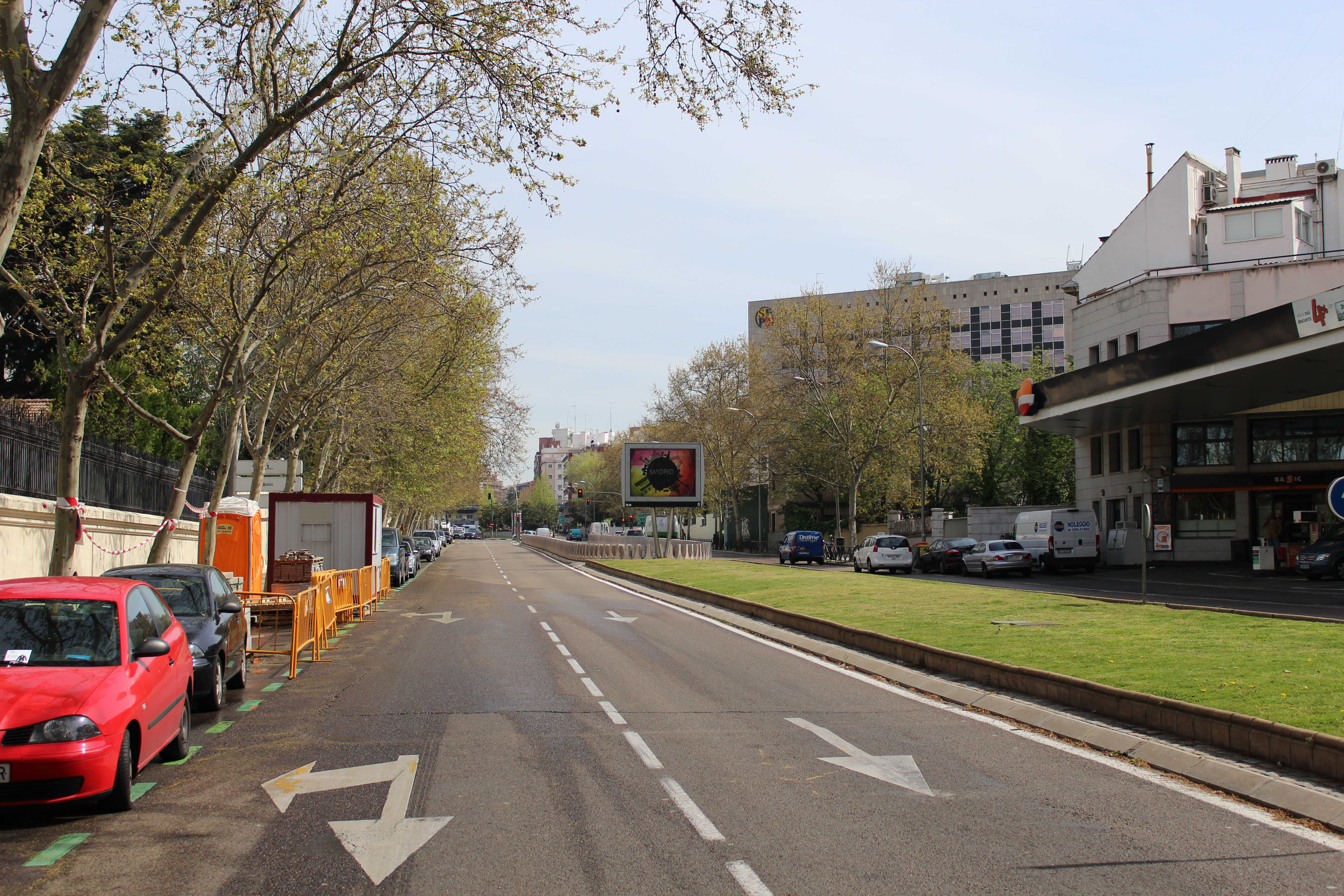 Calle de López de Hoyos, Madrid.